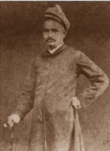 Dr Sakharam Arjun (1839-1885)